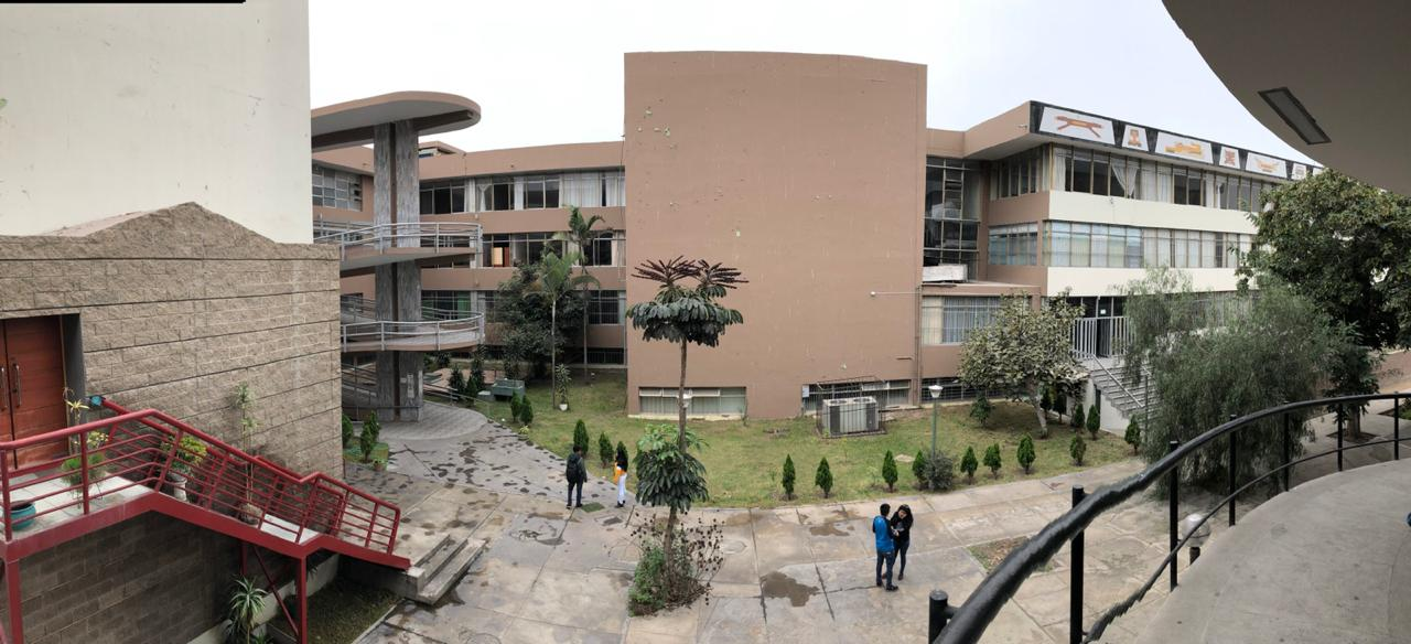 Parte trasera de la FDCP2